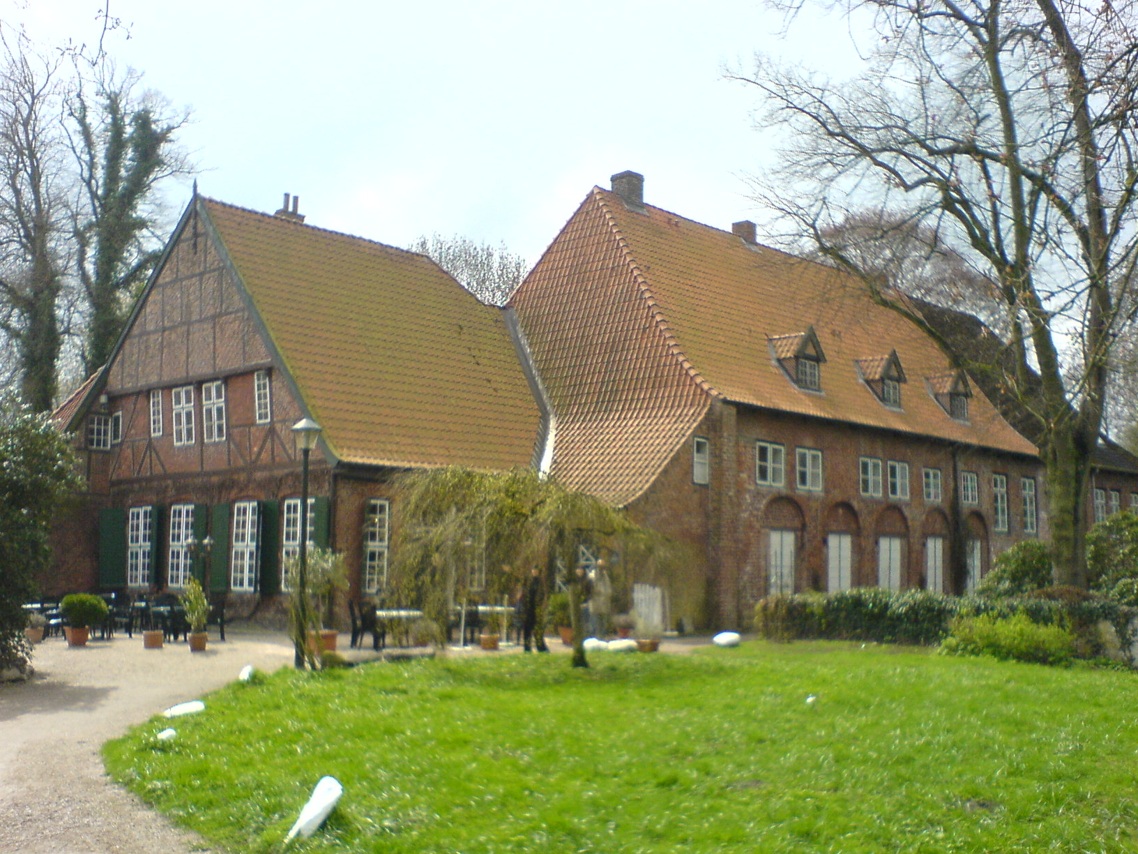 Kloster in Uetersen Sonstiges: ...